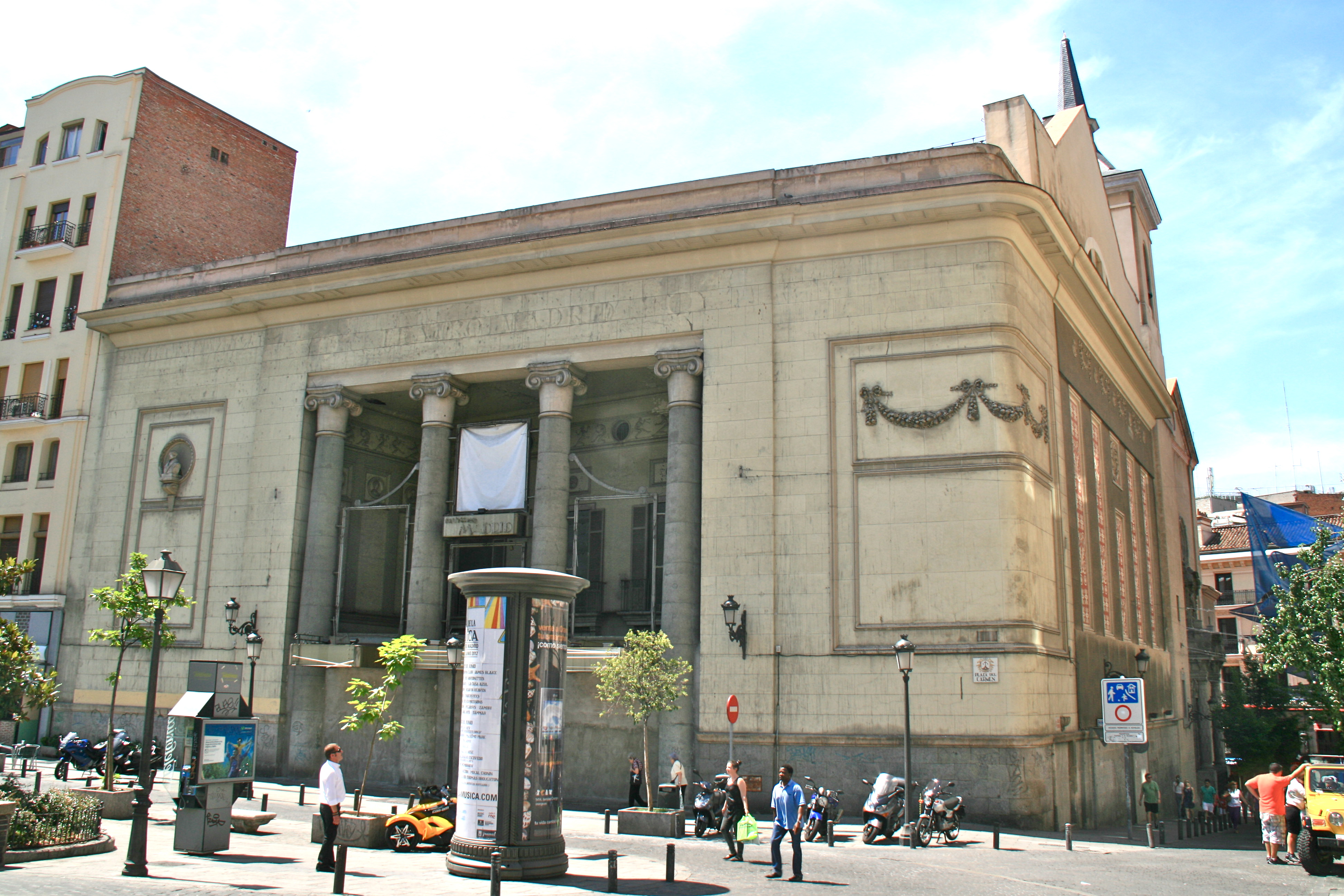 Cine Madrid - Plaza del Carmen